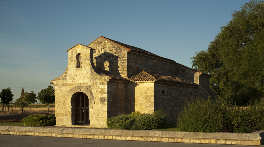 Iglesia de San Juan Bautista, 661